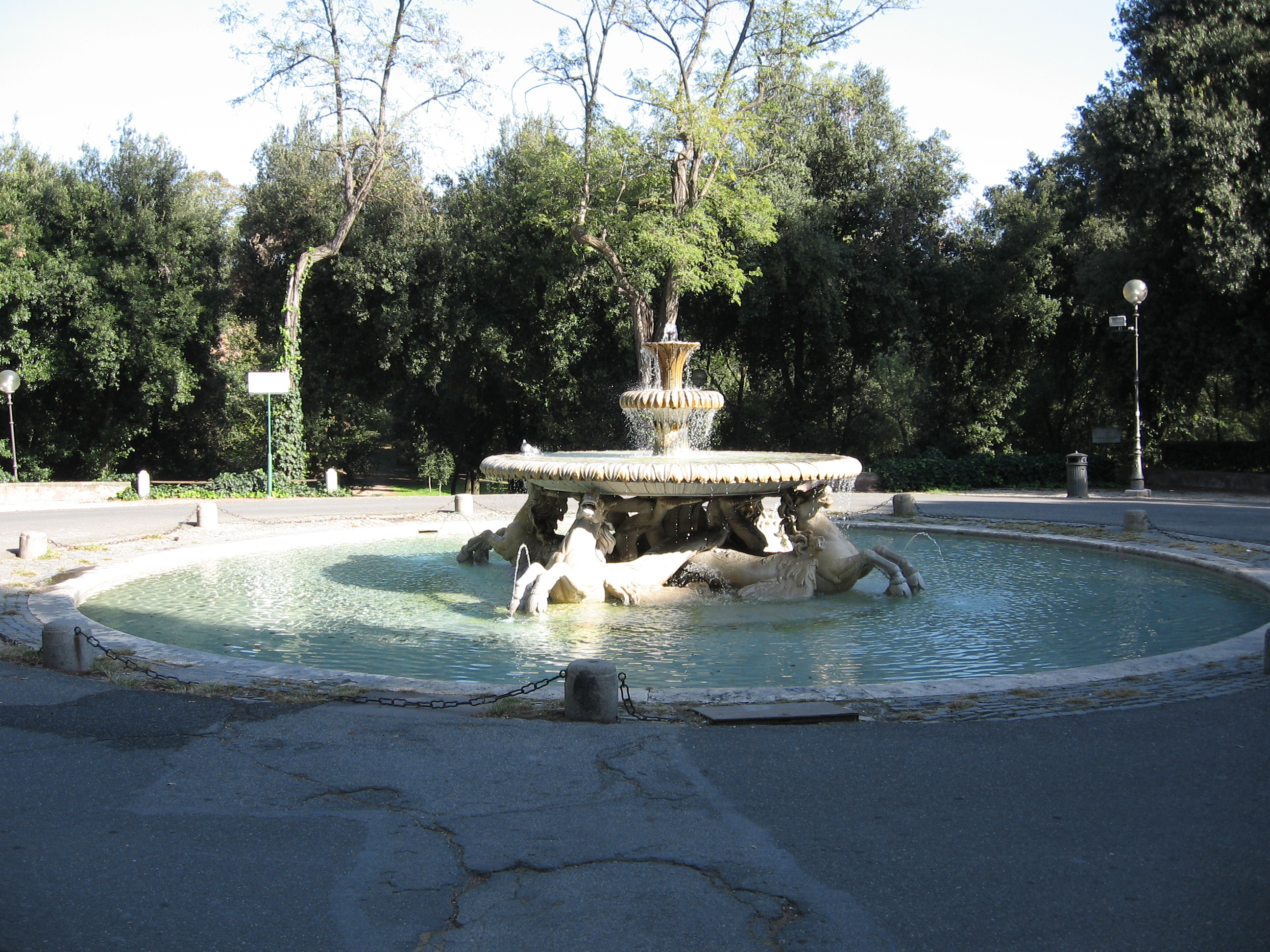 Piazzale dei cavalli marini, Villa Borghese, Roma